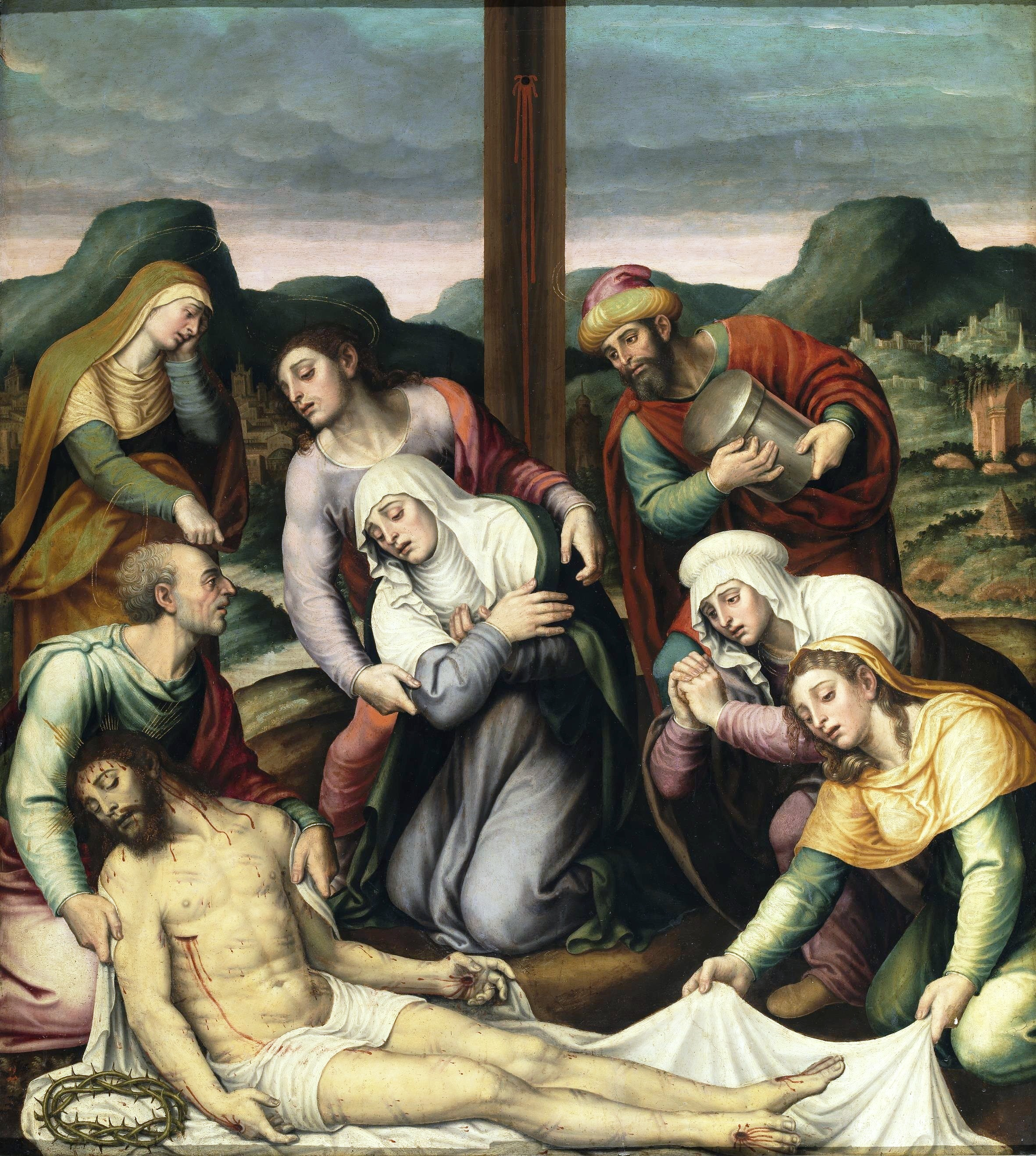 La obra representa a Jesucristo muerto y a sus familiares y discípulos lamentándose de su muerte.